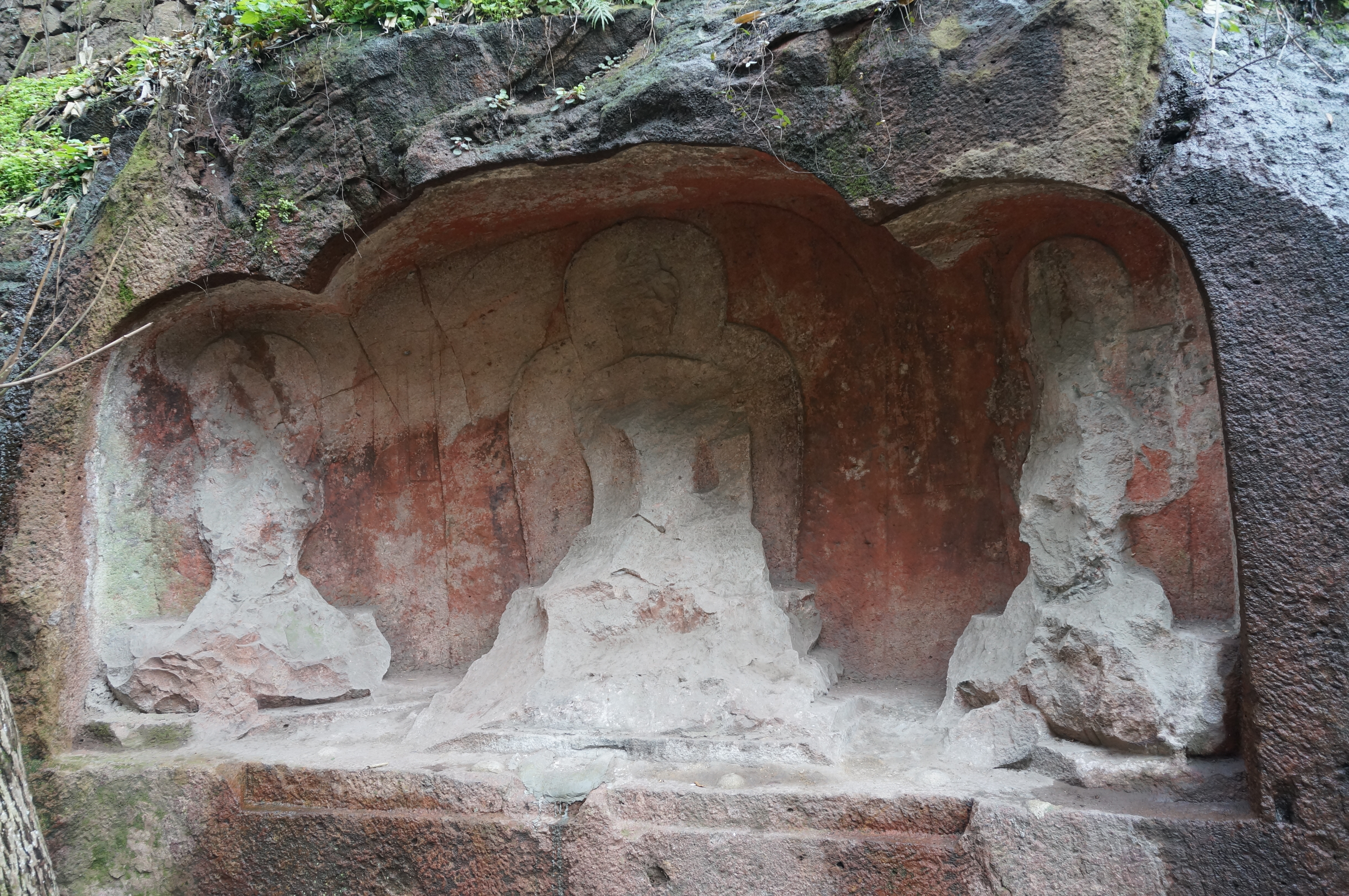 杭州宝石山造像，已毁的其中一龛。